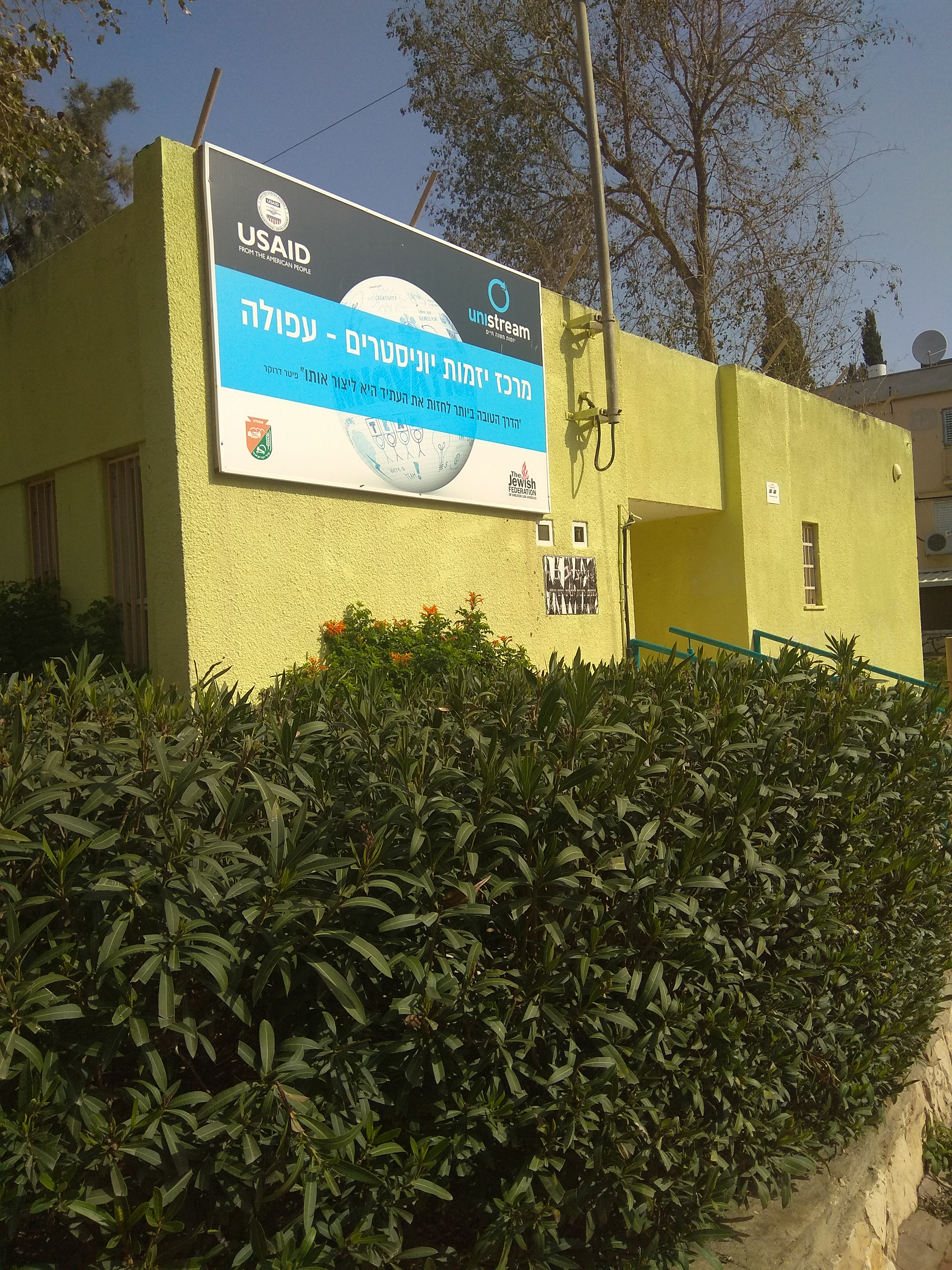 מרכז יזמות יוניסטרים בעפולה